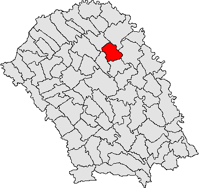 Categorie:Hărţi ale judeţului Botoşani